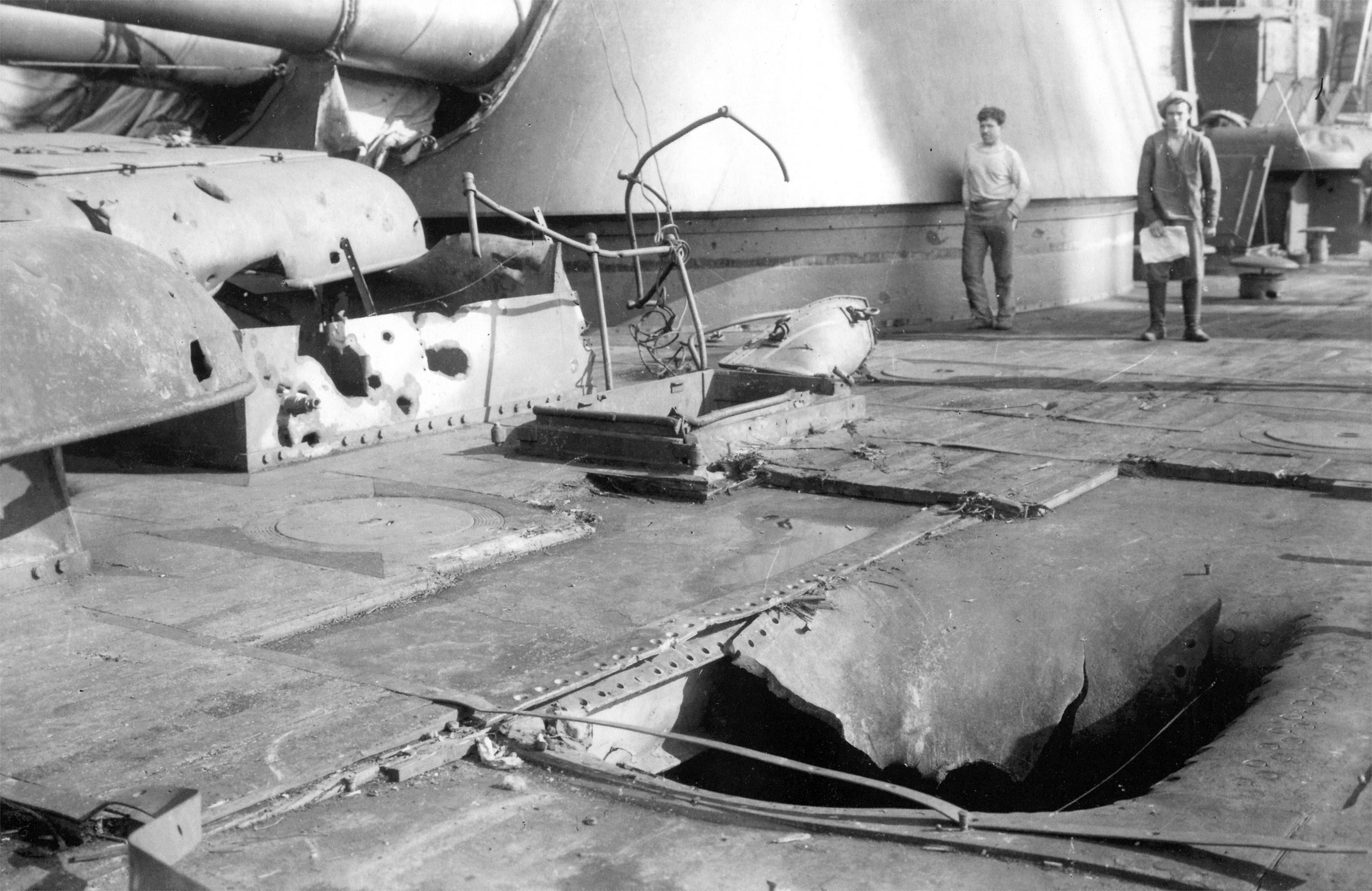 Руйнування на лінкорі "Петропавловськ" після придушення Кронштадського повстання